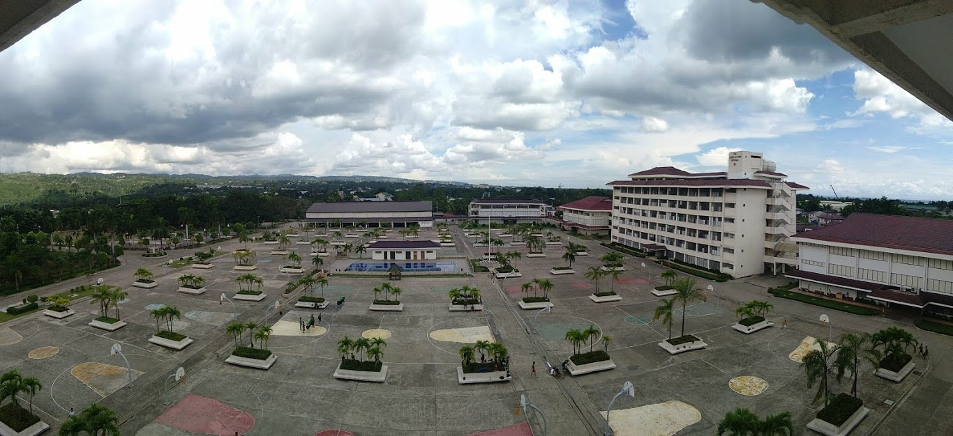 This is nice school in the island of cebu